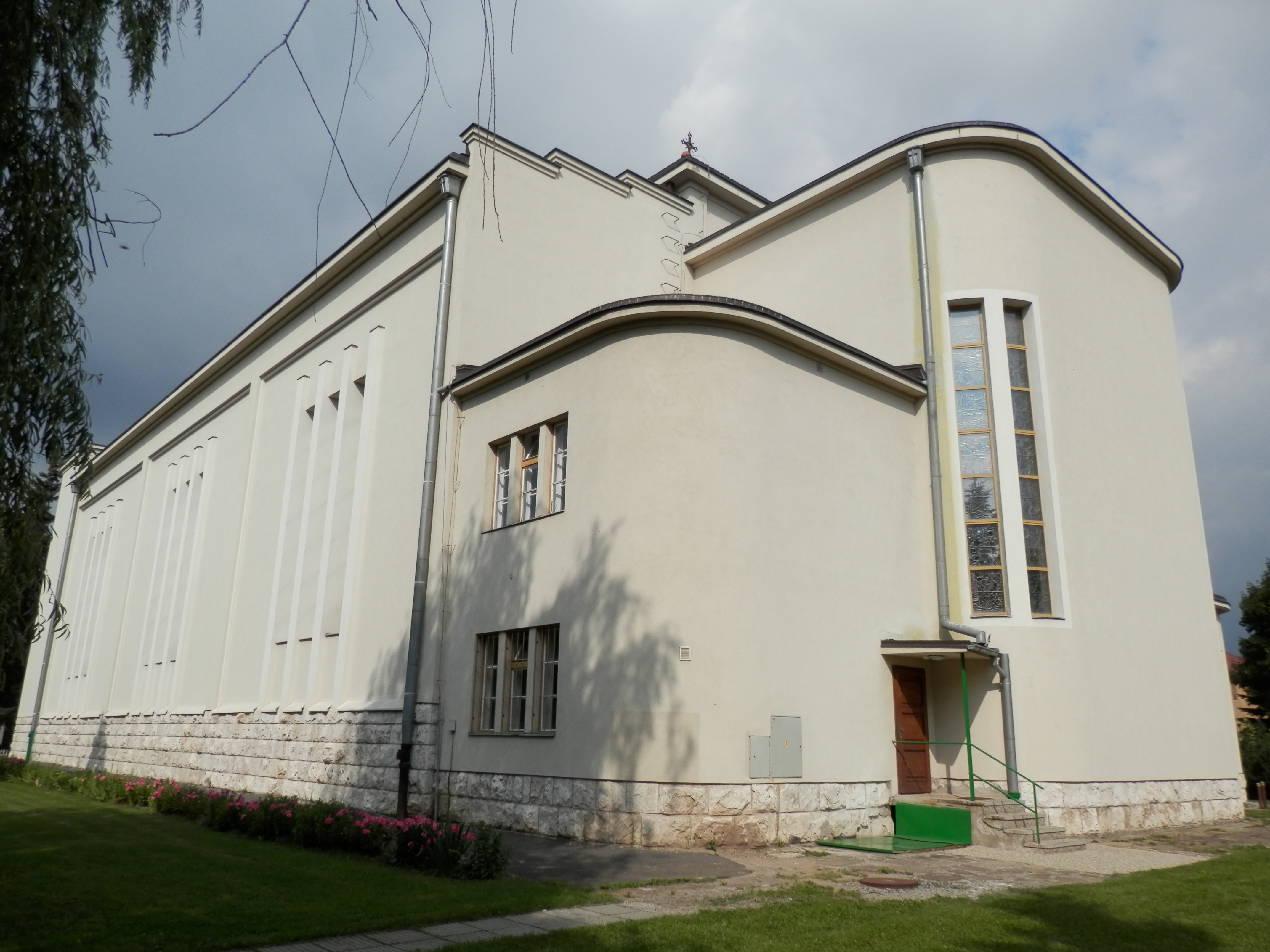 Konkatedrála Sedembolestnej Panny Márie, mesto Poprad.Región Spiš.